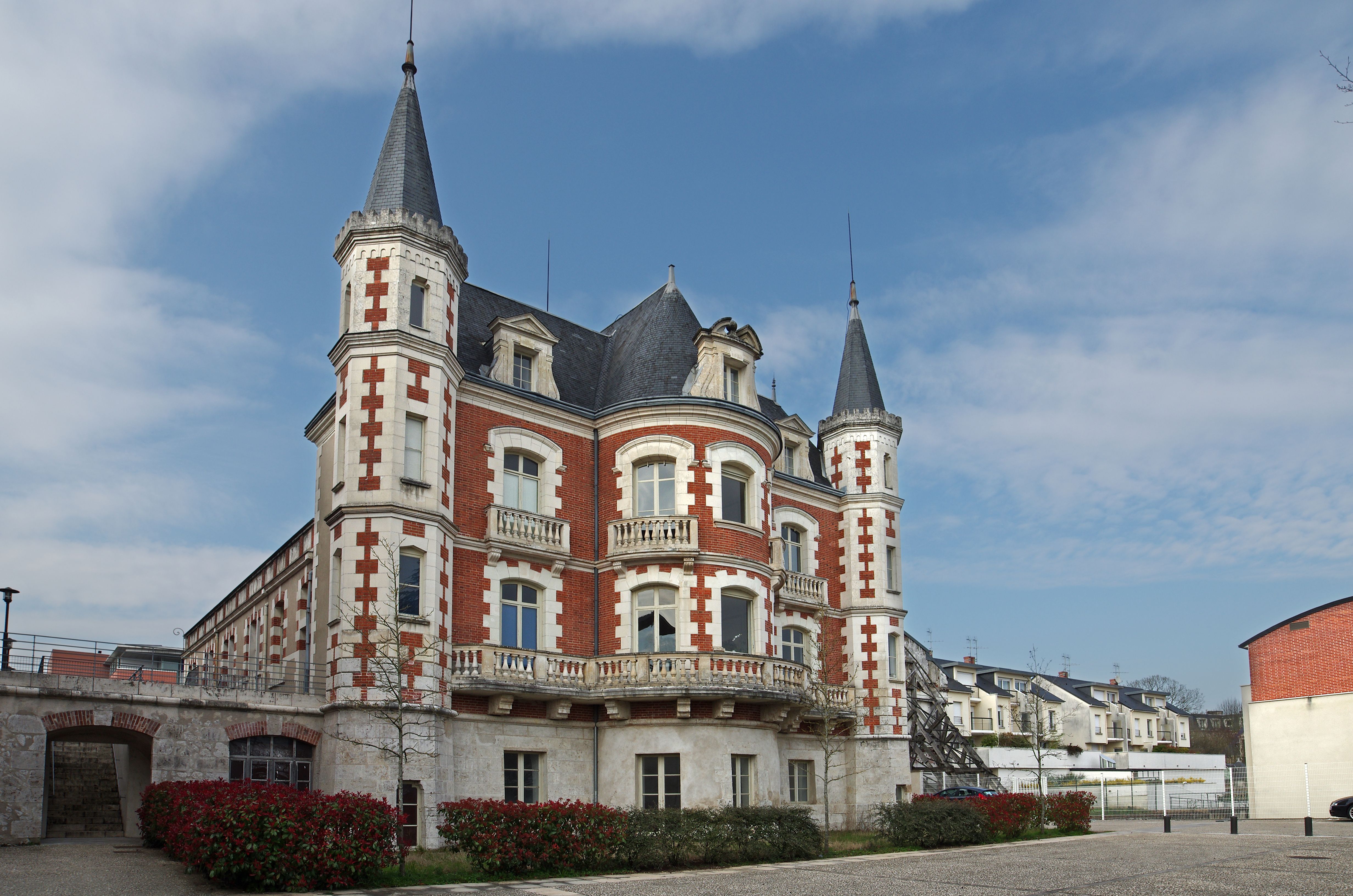 L'ancienne chocolaterie Poulain. Le château de la Villette. En 1872, l’architecte Poupard construit au centre de l’usine une demeure patronale. Celle-ci sera représentée sur les emballages. The Chocolate Factory Poulain. The château de la Villette. In 1872, the architect Poupard built in the center of the plant remains one employer. It will be shown on the packaging.